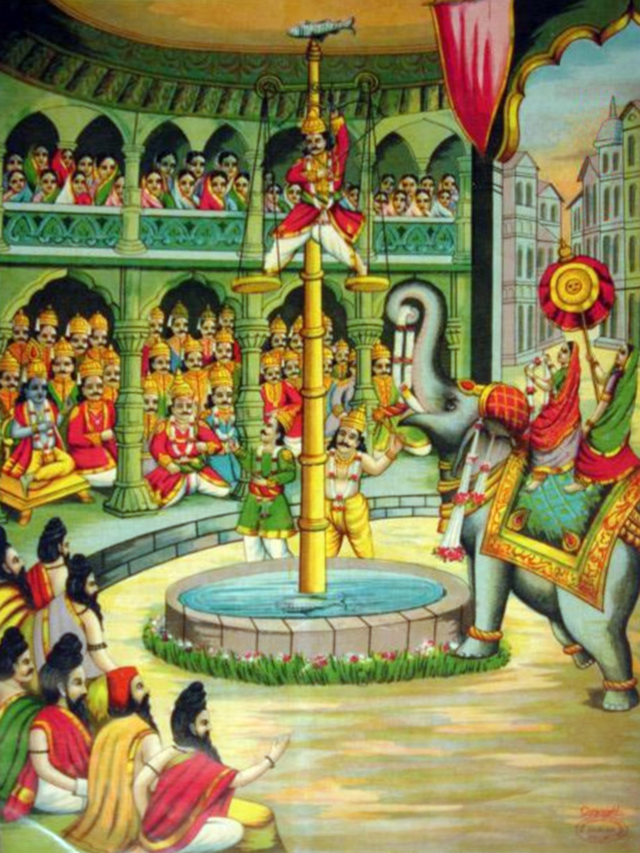 Source= Date=c.1920's Author=bazaar art Description=Arjuna's feat of archery: the "piercing of the fish" (bazaar art, c.1920's)